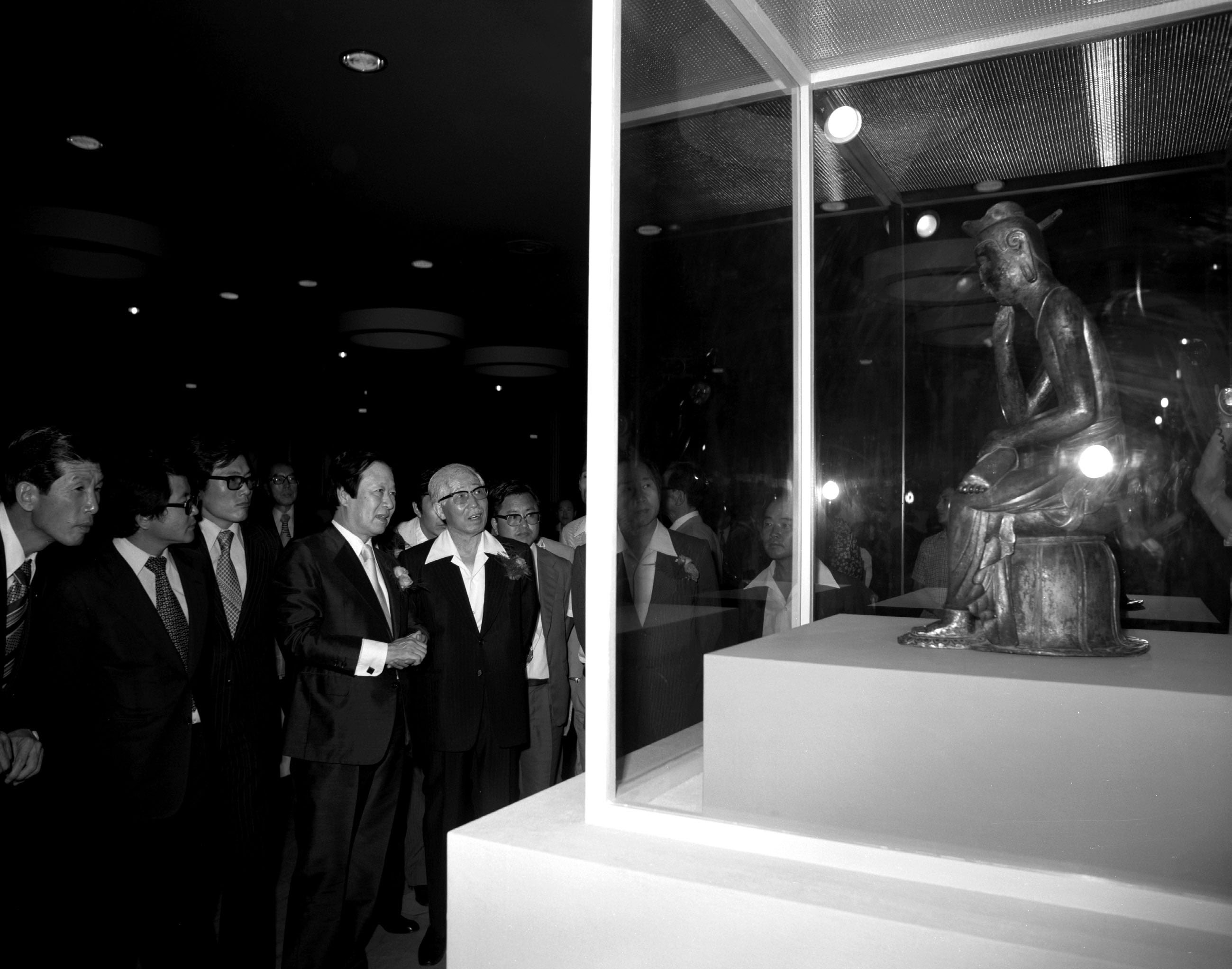 촬영장소 : 대한민국 서울 국립박물관 인물상세정보 : 미상(좌) 관련내용 : 국립박물관에서 열린 한국미술 5천년전